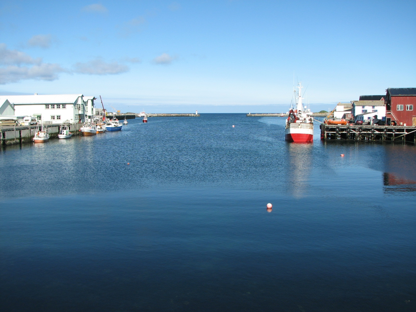 Utsikt nordover